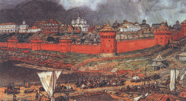 «Московский кремль при Иване III»